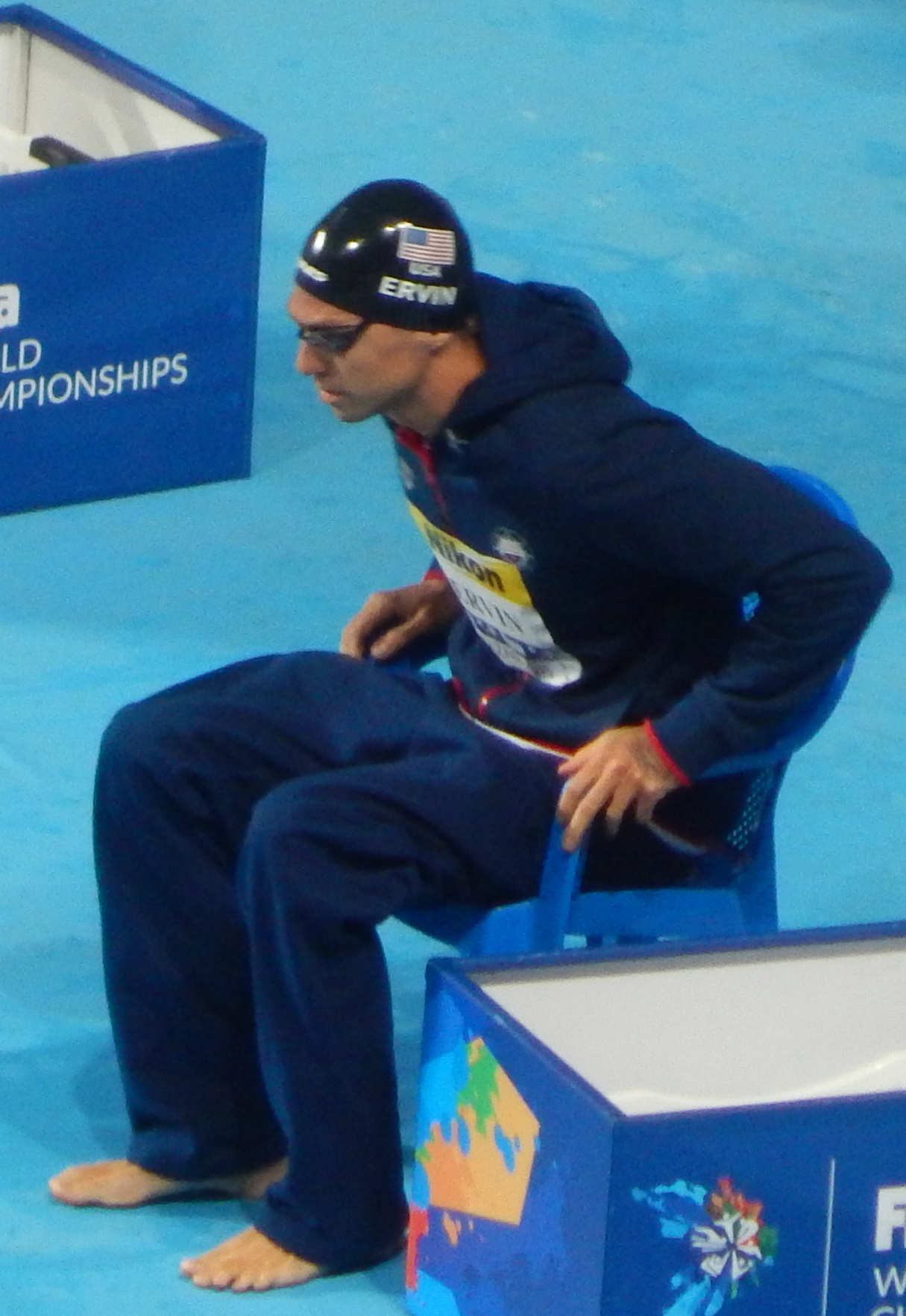 Морозов в Ирвин перед переплывкой на дистанции 50 метров в/с в Казани